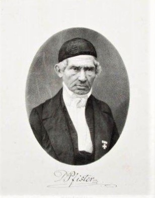 Johann Christian Pfister (Lithographie ca. 20,8 x 17 cm (Blatt))